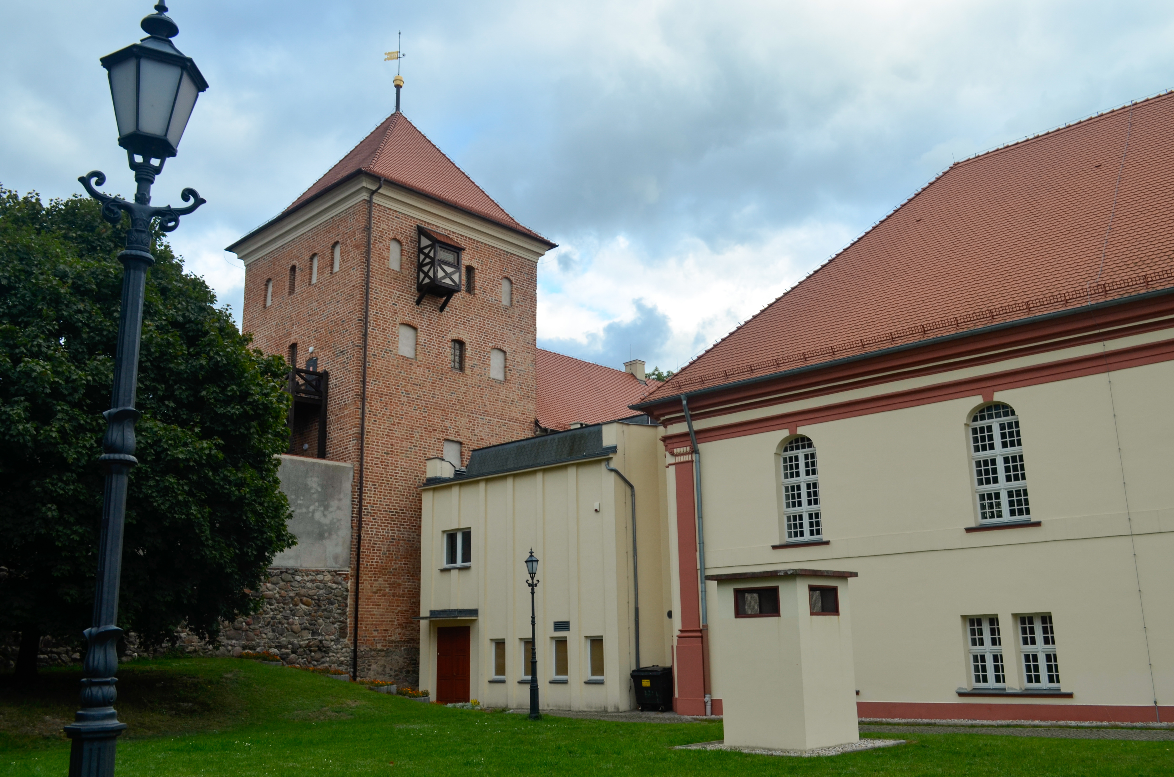 Sulechów - zamek (z wieżą), XV, XVIII